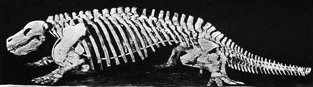 Diadectes skeleton